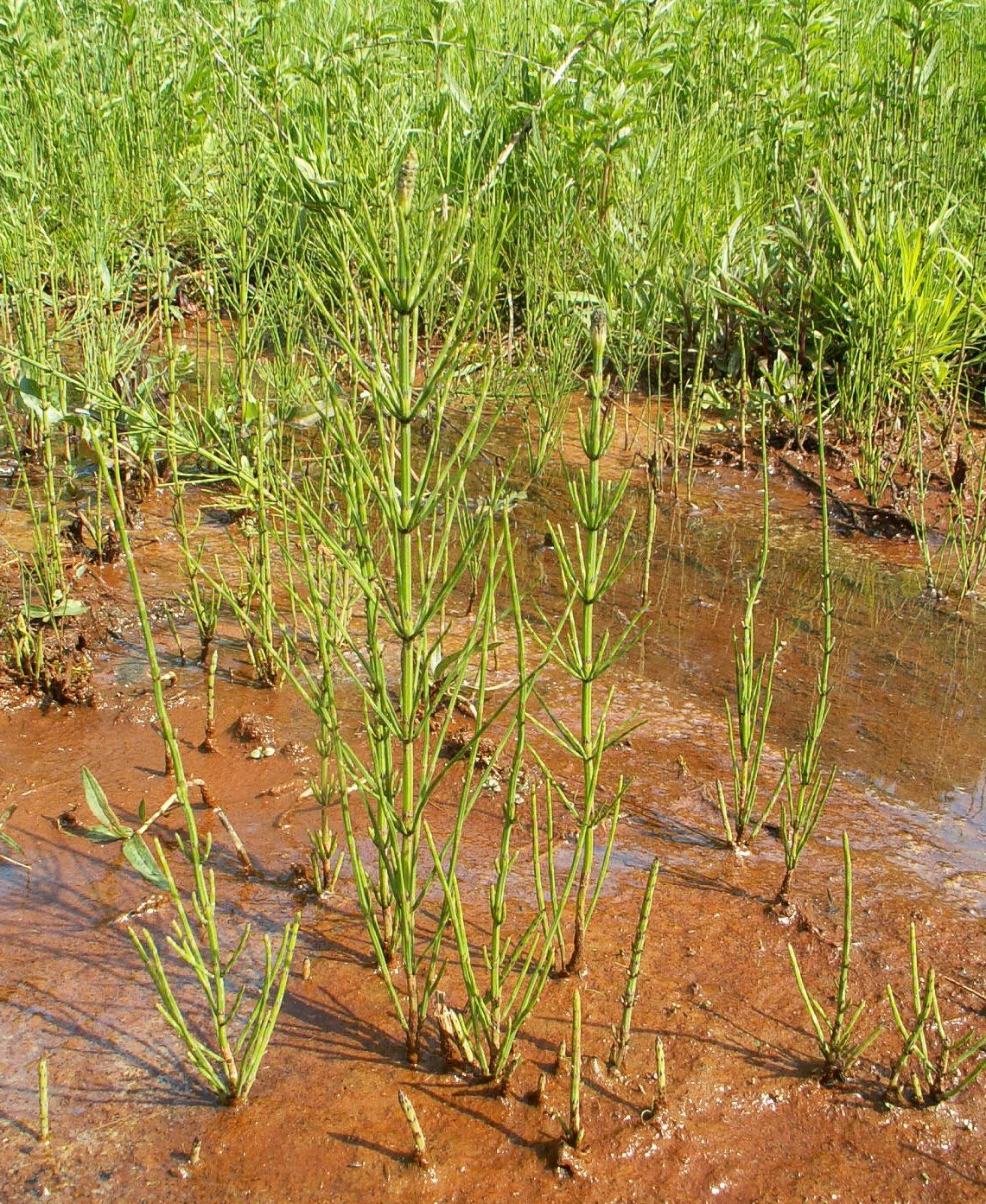 Equisetum palustre. Goleniów, NW Poland.